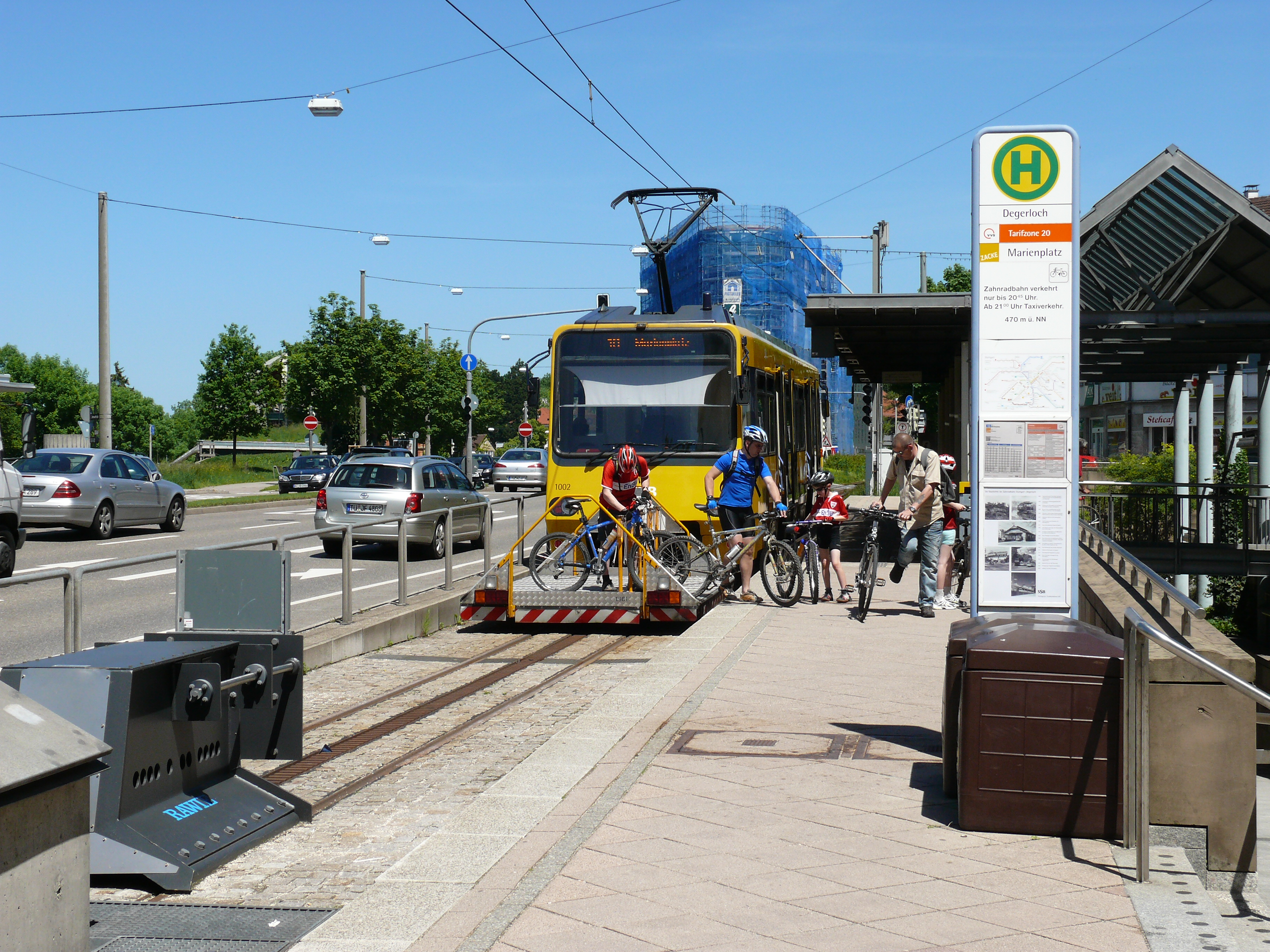 Fahrgäste entladen ihre Fahrräder vom Vorstellwagen der Stuttgarter Zahnradbahn, an der Endhaltestelle Degerloch.